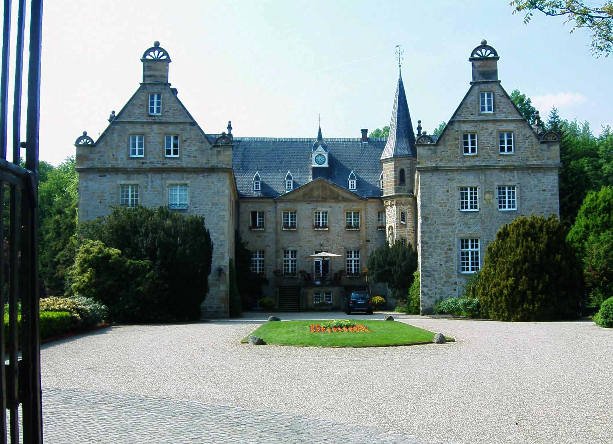 Castle Surenburg in Germany, Hörstel, Riesenbeck